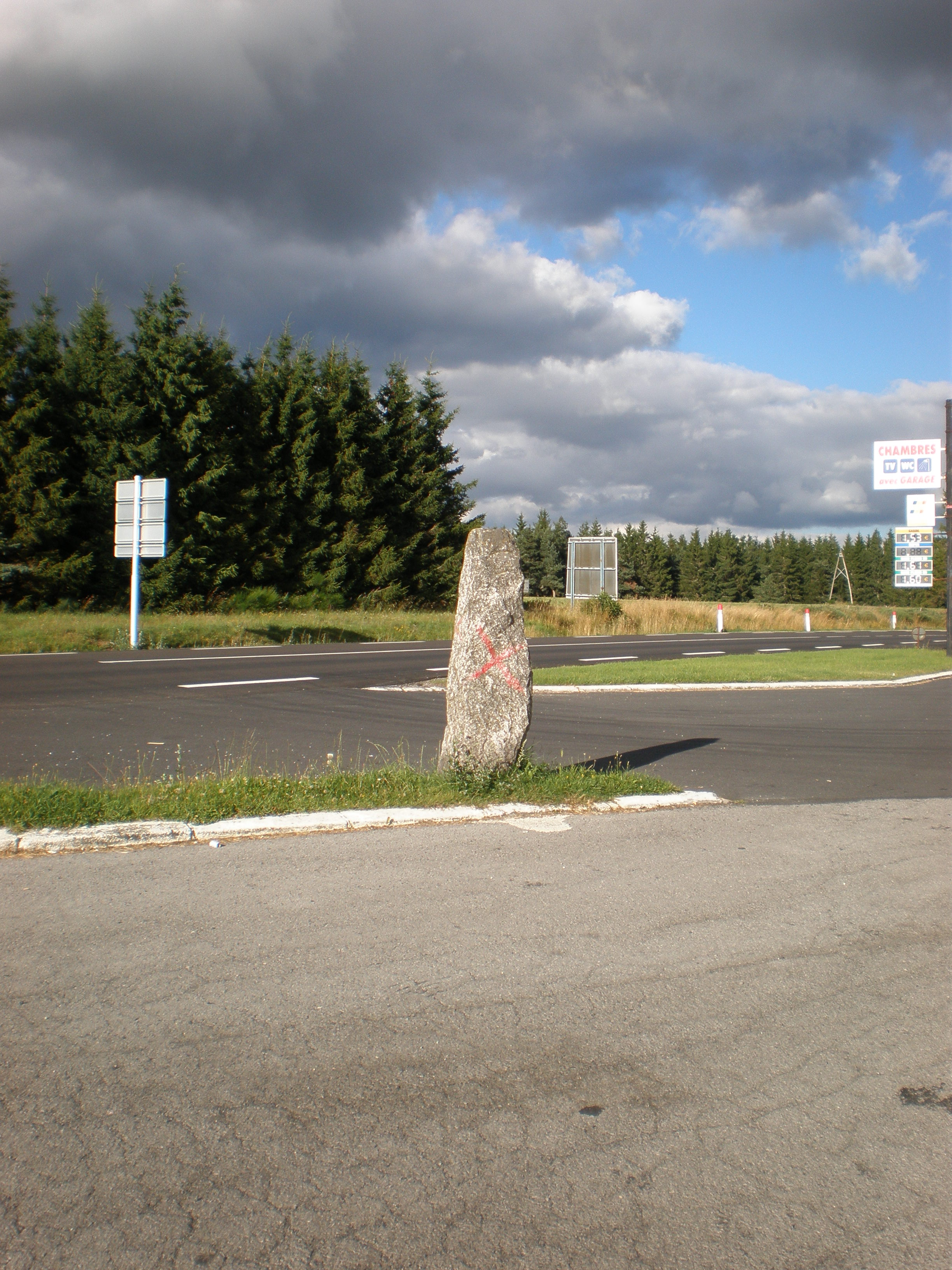 Pierre indiquant le lieu de l'exécution des époux Martin de l'Auberge de Peyrebeille (Ardèche)